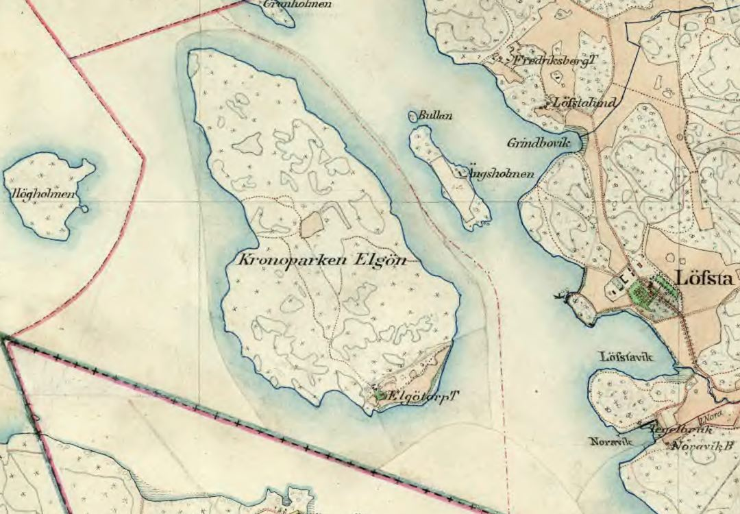 Älgön i Mälaren på Häradsekonomiska kartan